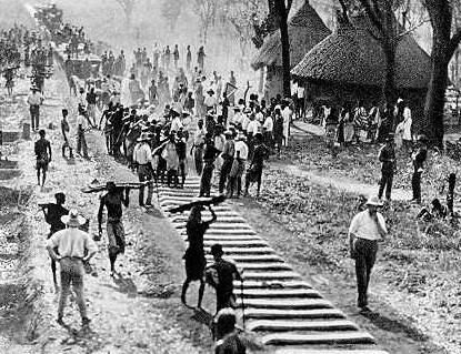 Lingála: Nzelá-masíni ya Katanga (CFK) ekómakí ya Elisabethville.